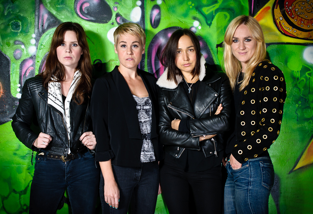 Sahara Hotnights fotade på Kafé 44 i Stockholm. Från vänster: Johanna Asplund, Jennie Asplund, Maria Andersson och Josephine Forsman.